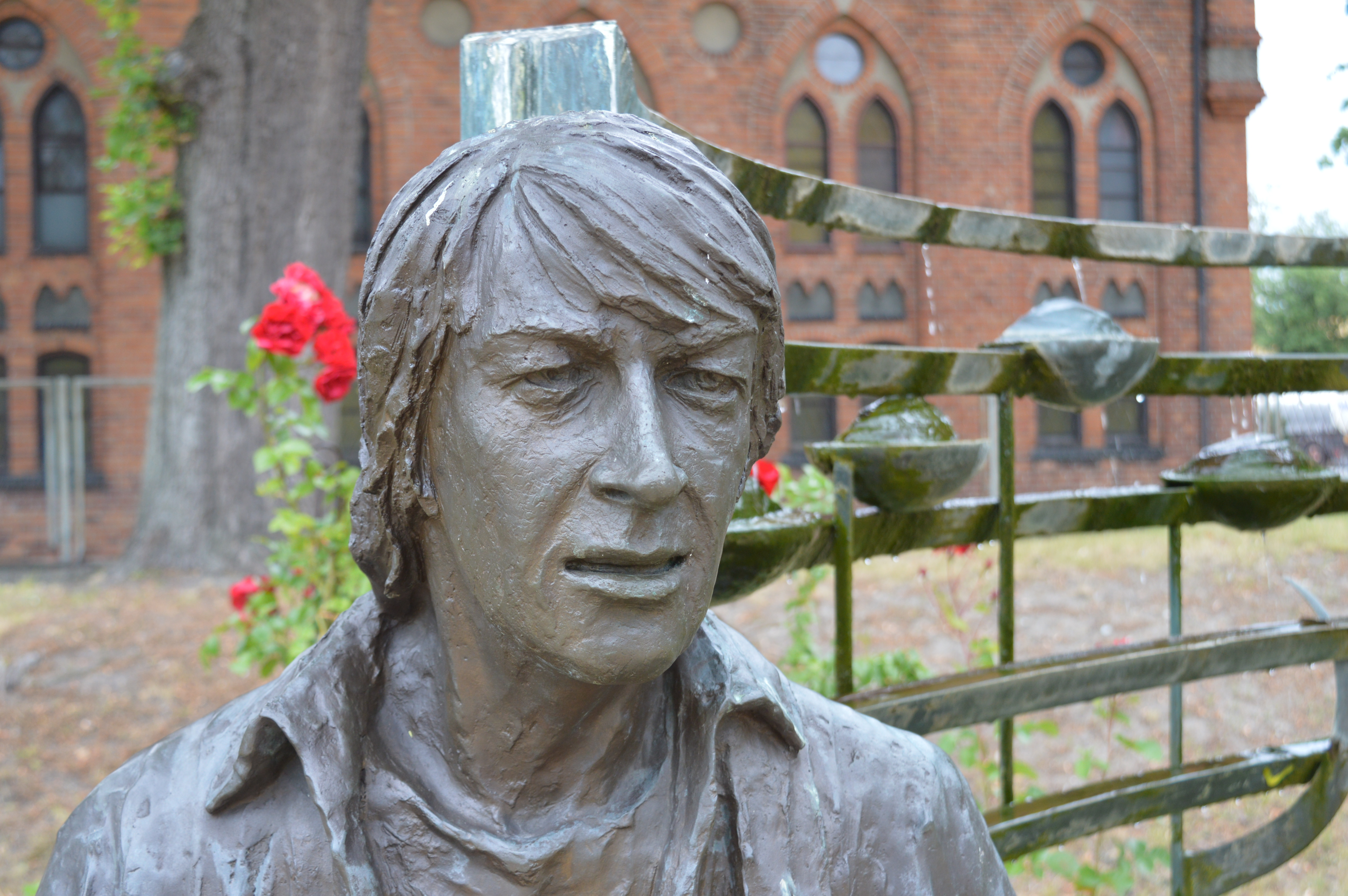 Rzeźba Krzysztofa Klenczona - pasaż miejski w Szczytnie